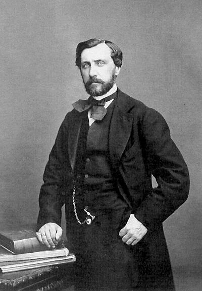 Князь Николай Борисович Юсупов